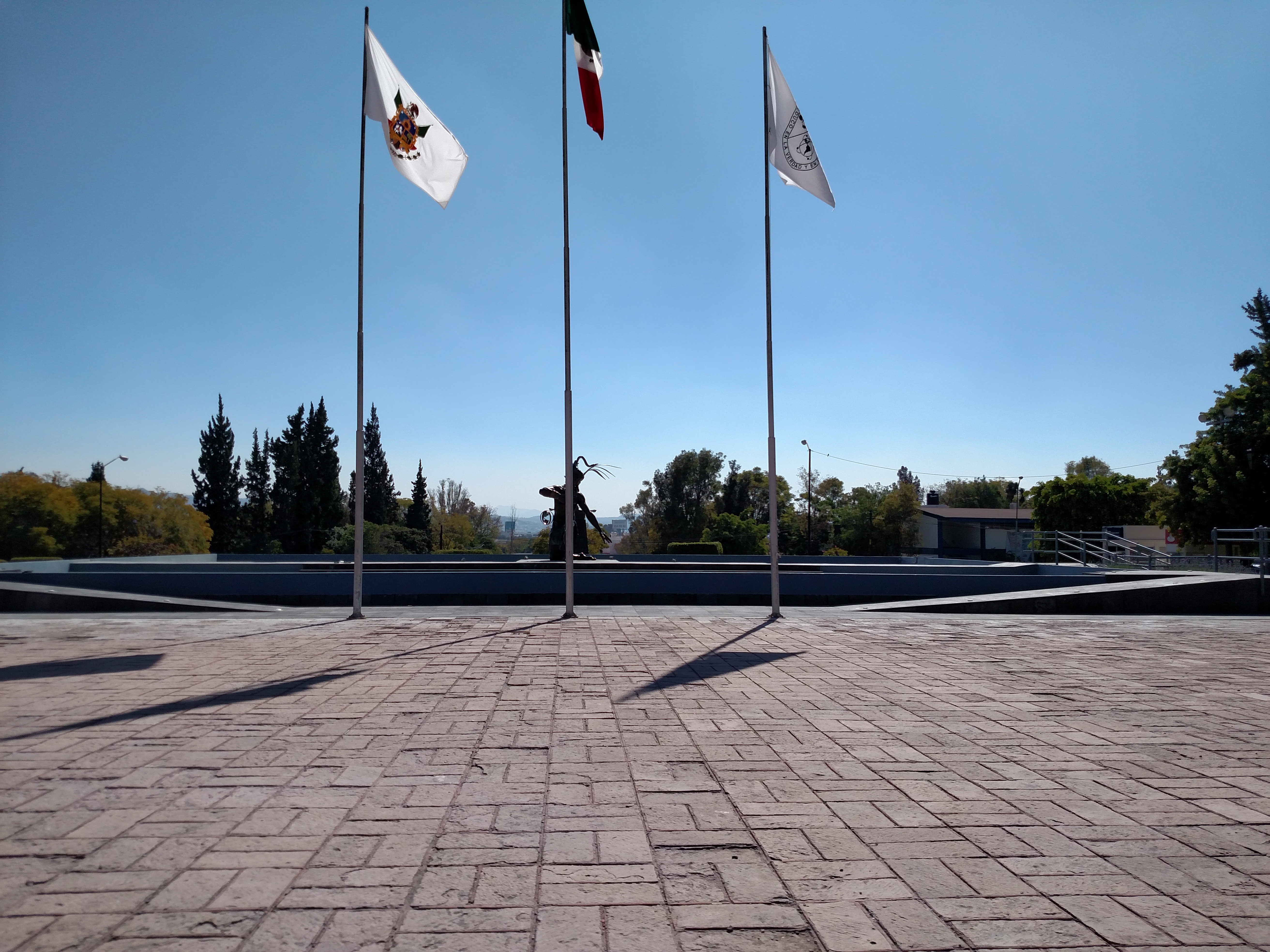 Astas Banderas, Explanada de rectoría, UAQ 2016.